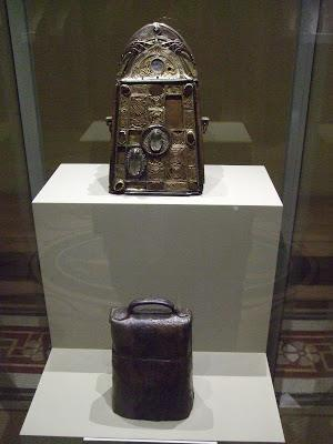 Patricks klokke i nasjonalmuseet i Dublin, med etui